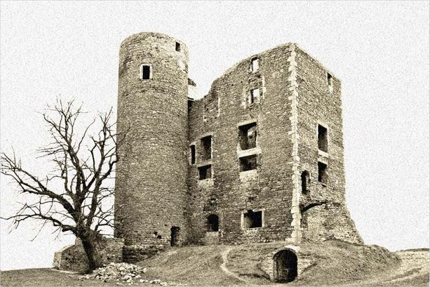 Burgruine Arnstein bei Harkerode, Sachsen-Anhalt, erbaut 1130, 2004-04-03